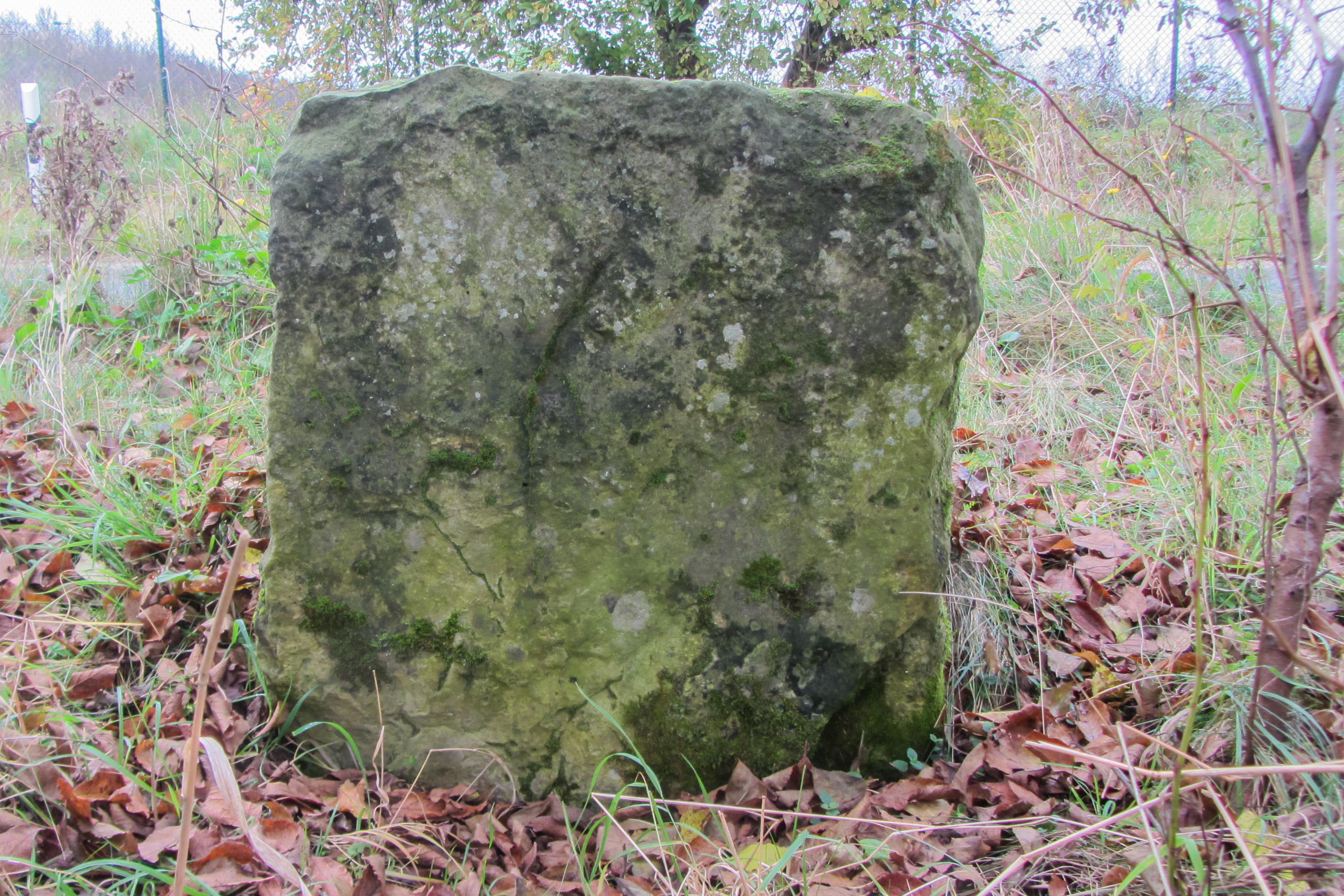 Preußischer Viertelmeilenwürfel südlich der Ortslage, an der K 1064; Abschnitt 004, km 0,2 in Hohenberg-Krusemark OT Alzenzaun